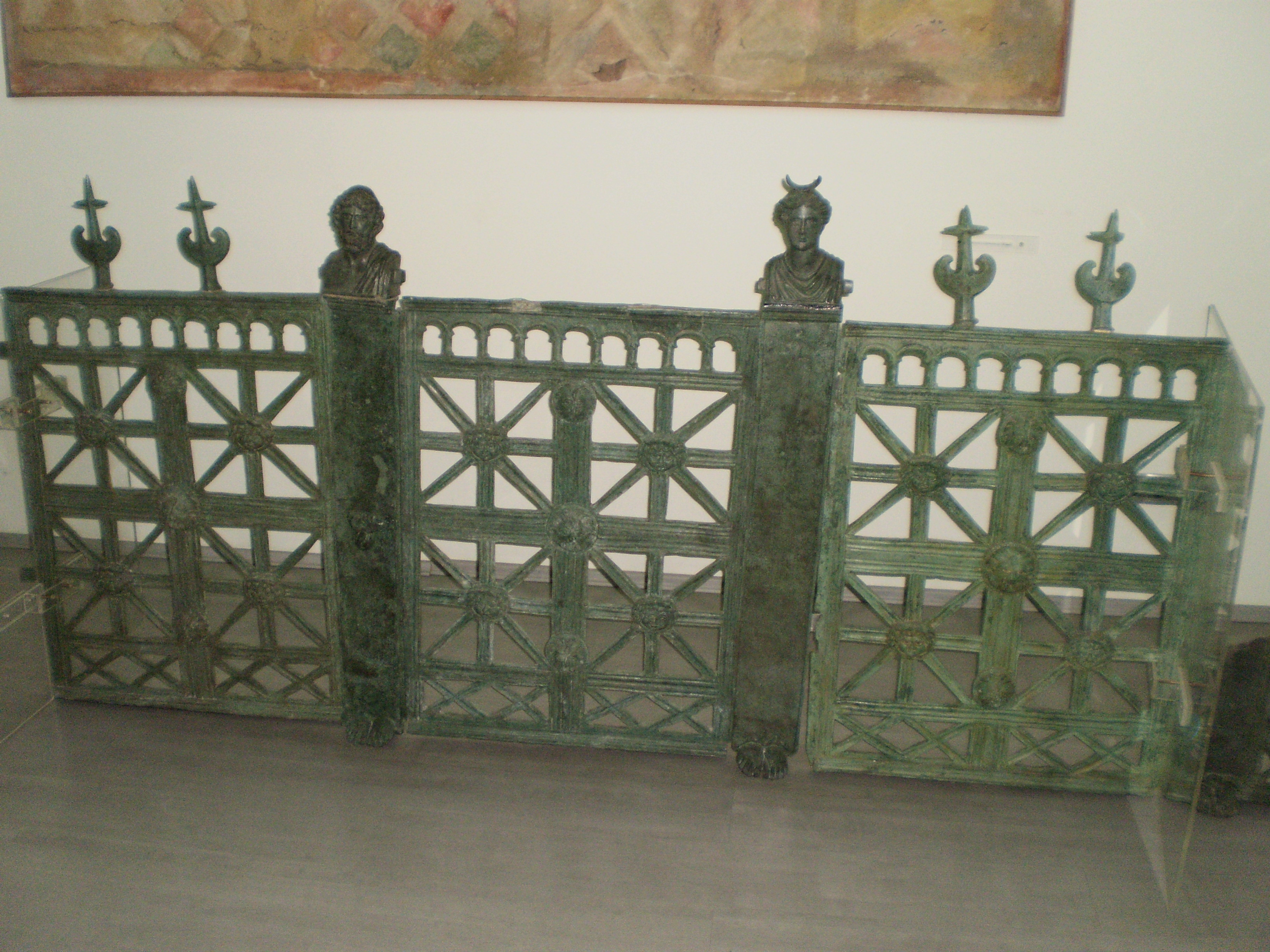 Arheološki park Medijana Niš, deo montažne ograde od livene bronze. Autor slike dr Milorad Dimić